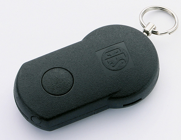 OMEGA ACTIVE Transponder der Firma CEStronics aus Velbert